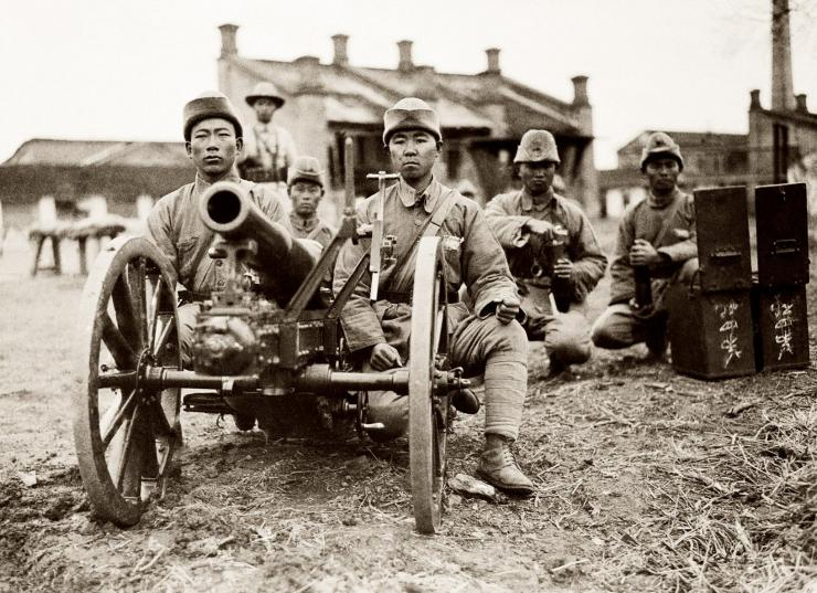 直魯連軍砲兵。